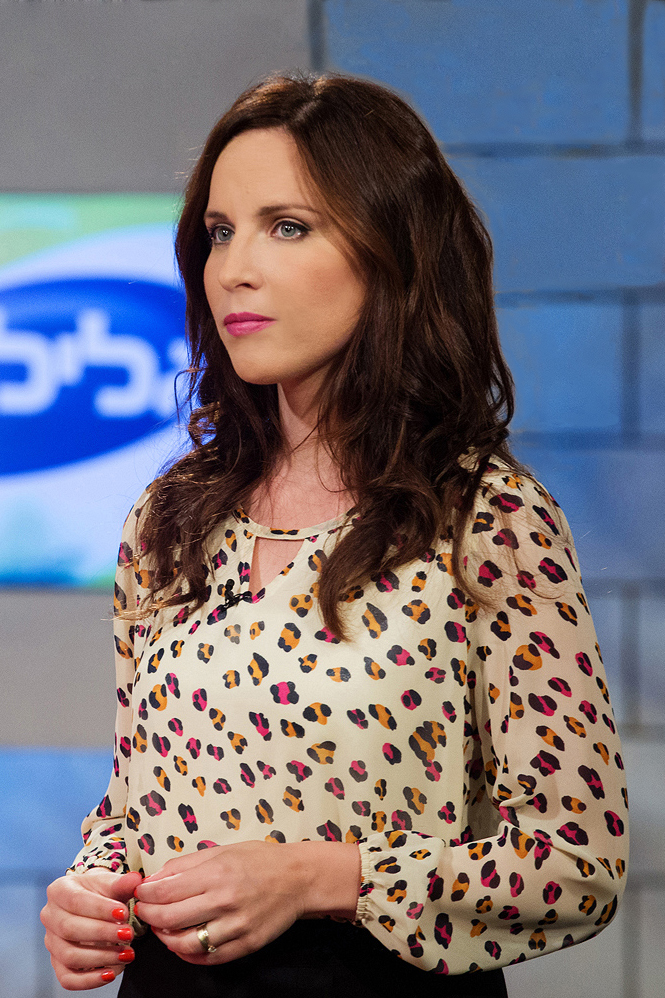 הילה קורח באולפן התוכנית "גלילאו" בהנחייתה